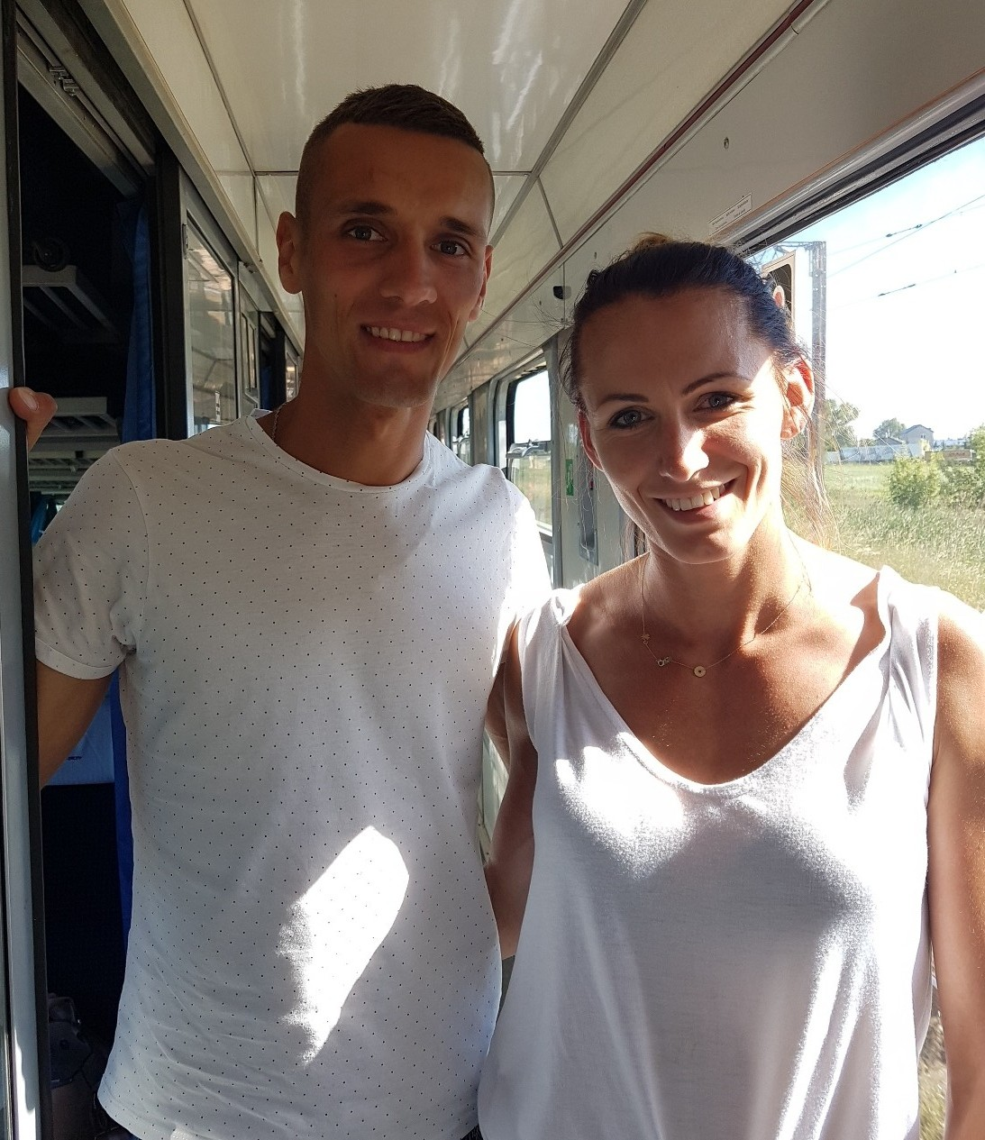 Paulina Kaczyńska z Damianem Kabatem